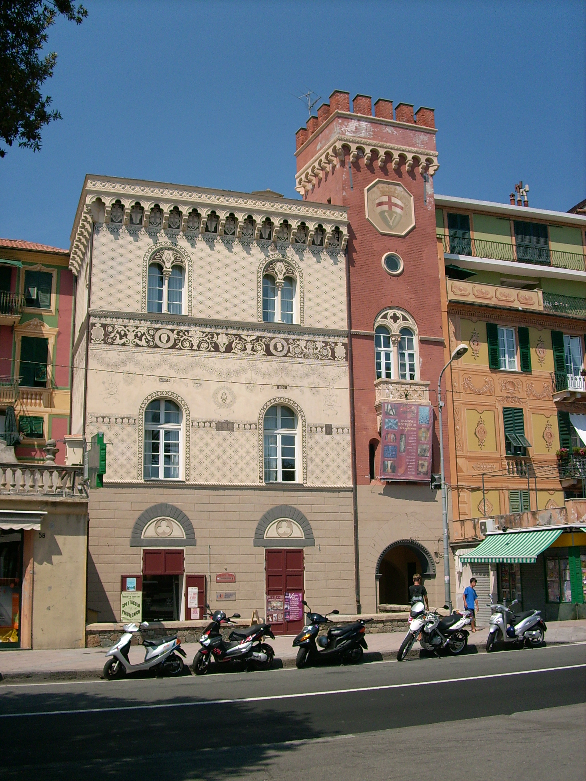 Varazze, Liguria, Italia